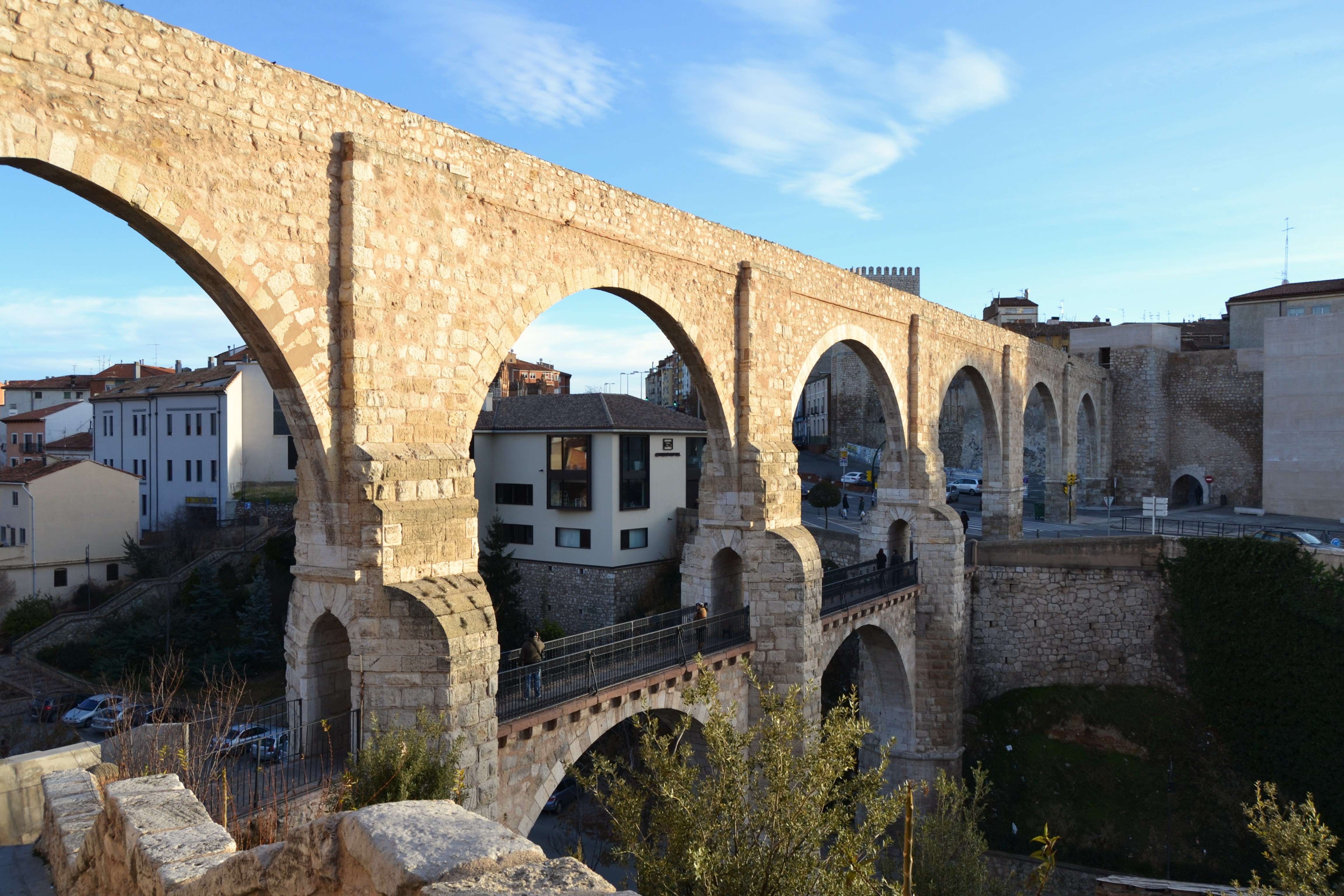 Aqüeducte de los Arcos, Terol.